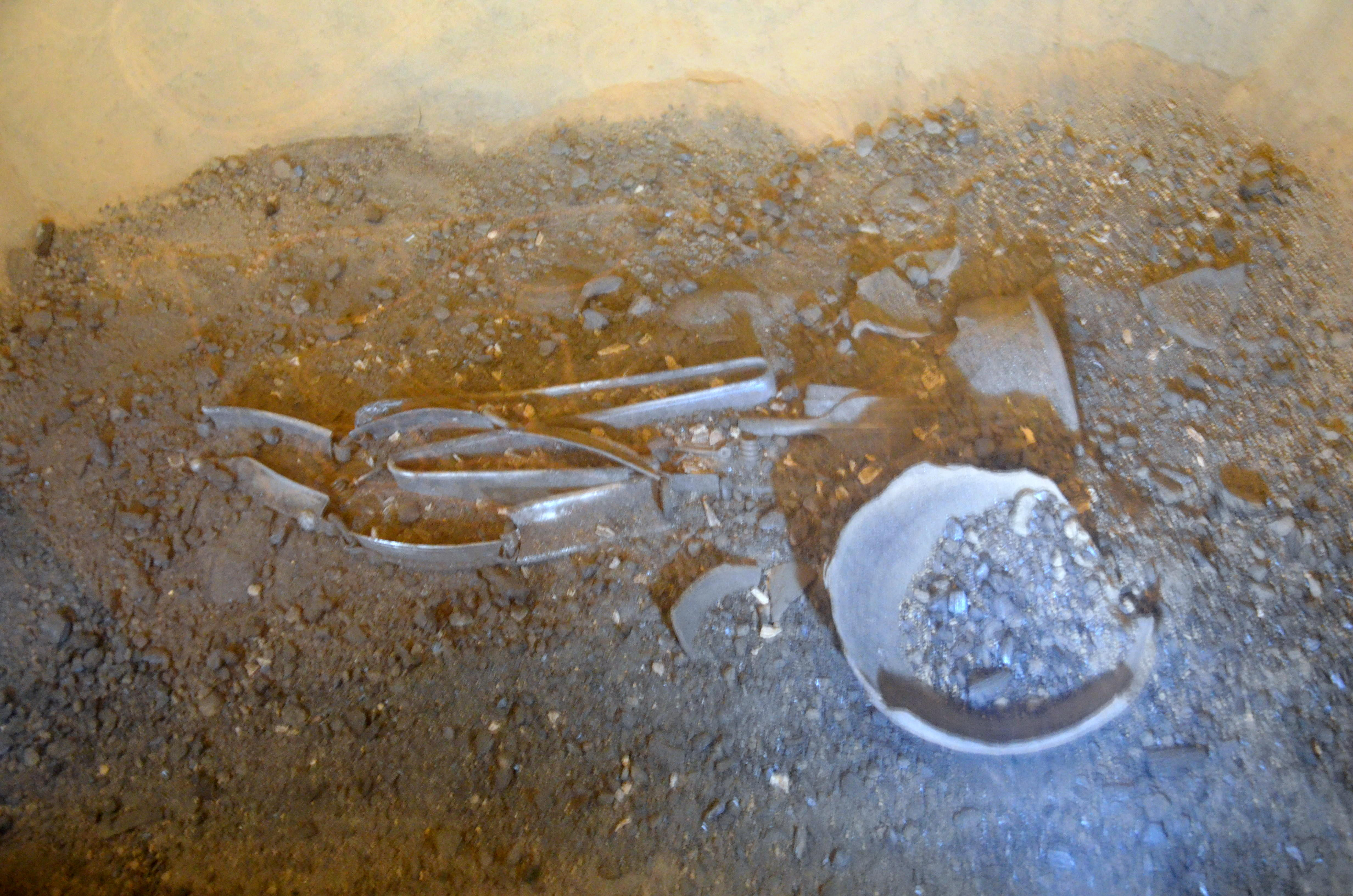 Totenritual der keltischen Bevölkerung in Südpolen der Przeworsk-Kultur im 3.Jh. v. Chr